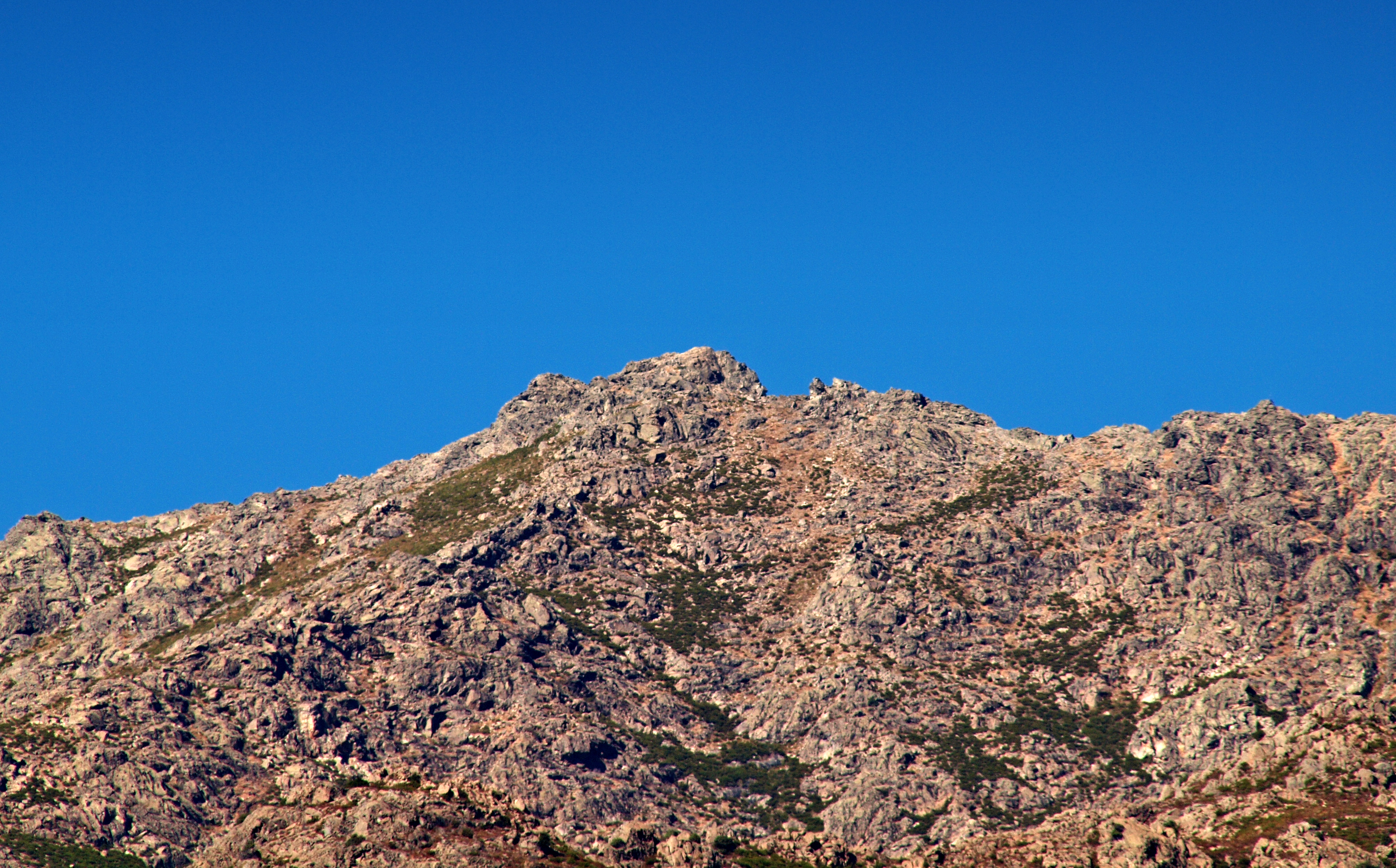 Monte Astu (Corsica) - 1535 m, à cheval sur Lama et Sorio, vu depuis Pedano (Pietralba)